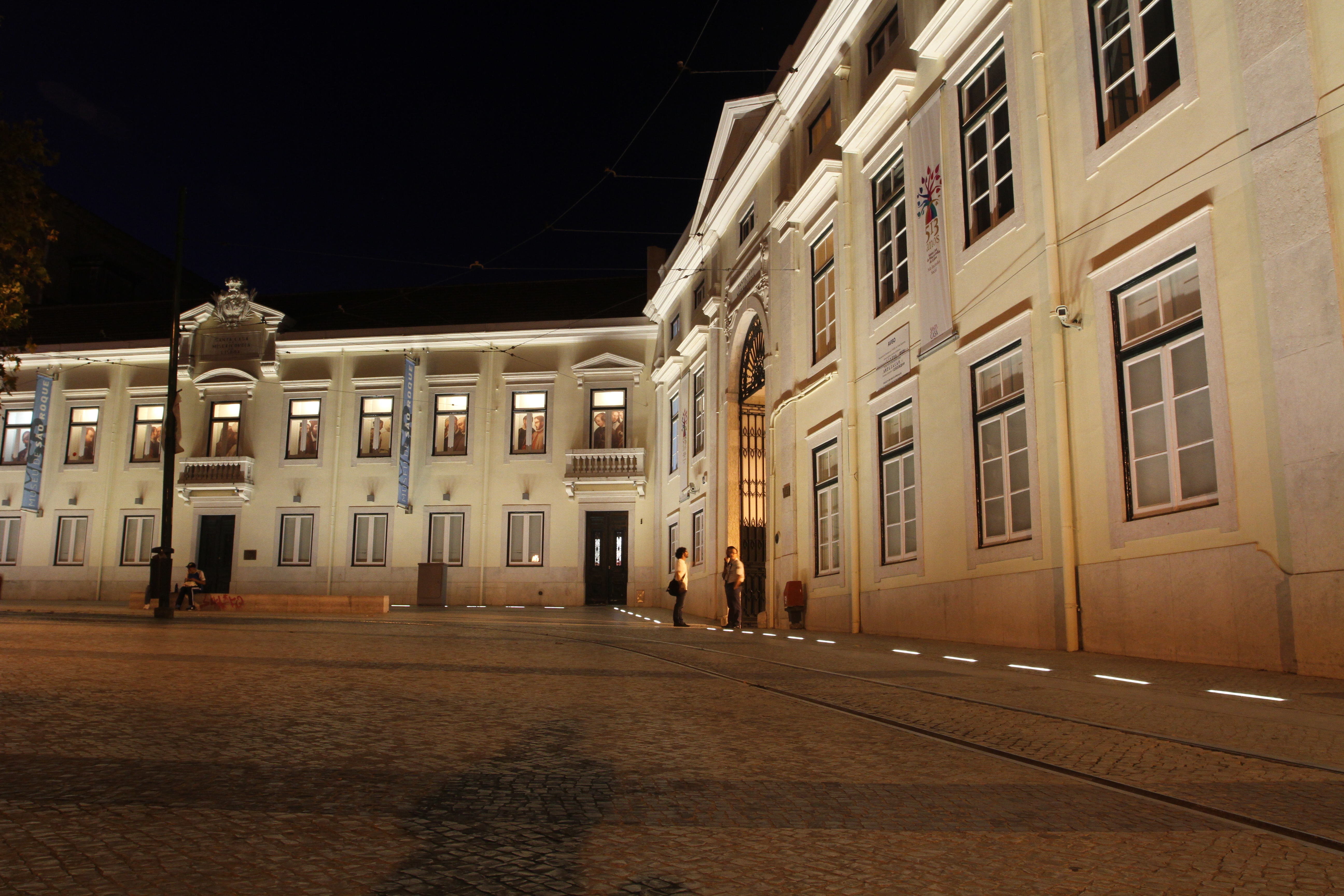 Largo Trindade Coelho This file was uploaded for Wiki Loves Monuments in Portugal with the unique identifier 97026939.